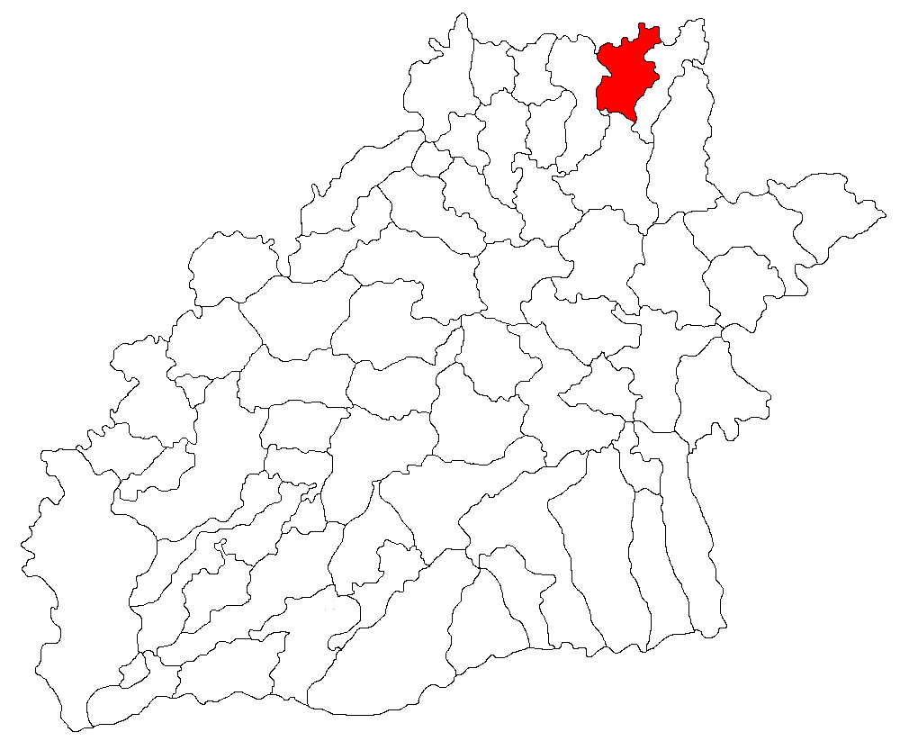 Categorie:Hărţi ale judeţului Sibiu Licensing Categorie:Imagini din Transilvania